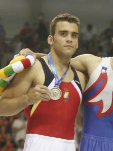 El gimnasta Manuel Carballo en los Juegos del Mediterráneo de Almería 2005. Recorte de fotografía original hecha por mí.